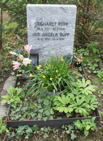 Friedhof Neustift-Sieghardt Rupp